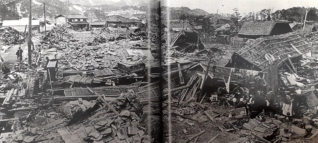 1927年に発生した北丹後地震（丹後大震災）における、京都府竹野郡網野町の網野市街地の被害状況。